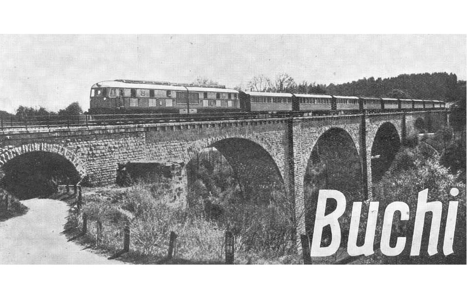 Foto der CFR DE 241 auf einem Werbeplakat von Büchi